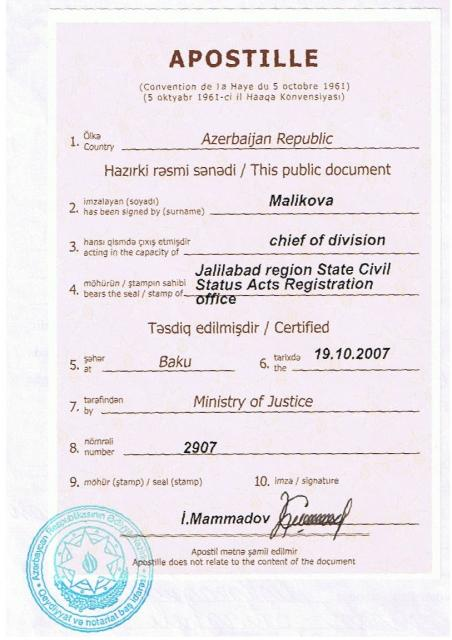 Апостиль (Азербайджан)